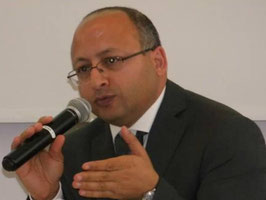 Mimoun Azizi während eines Vortrages über Demenz in Arnsberg (2013)